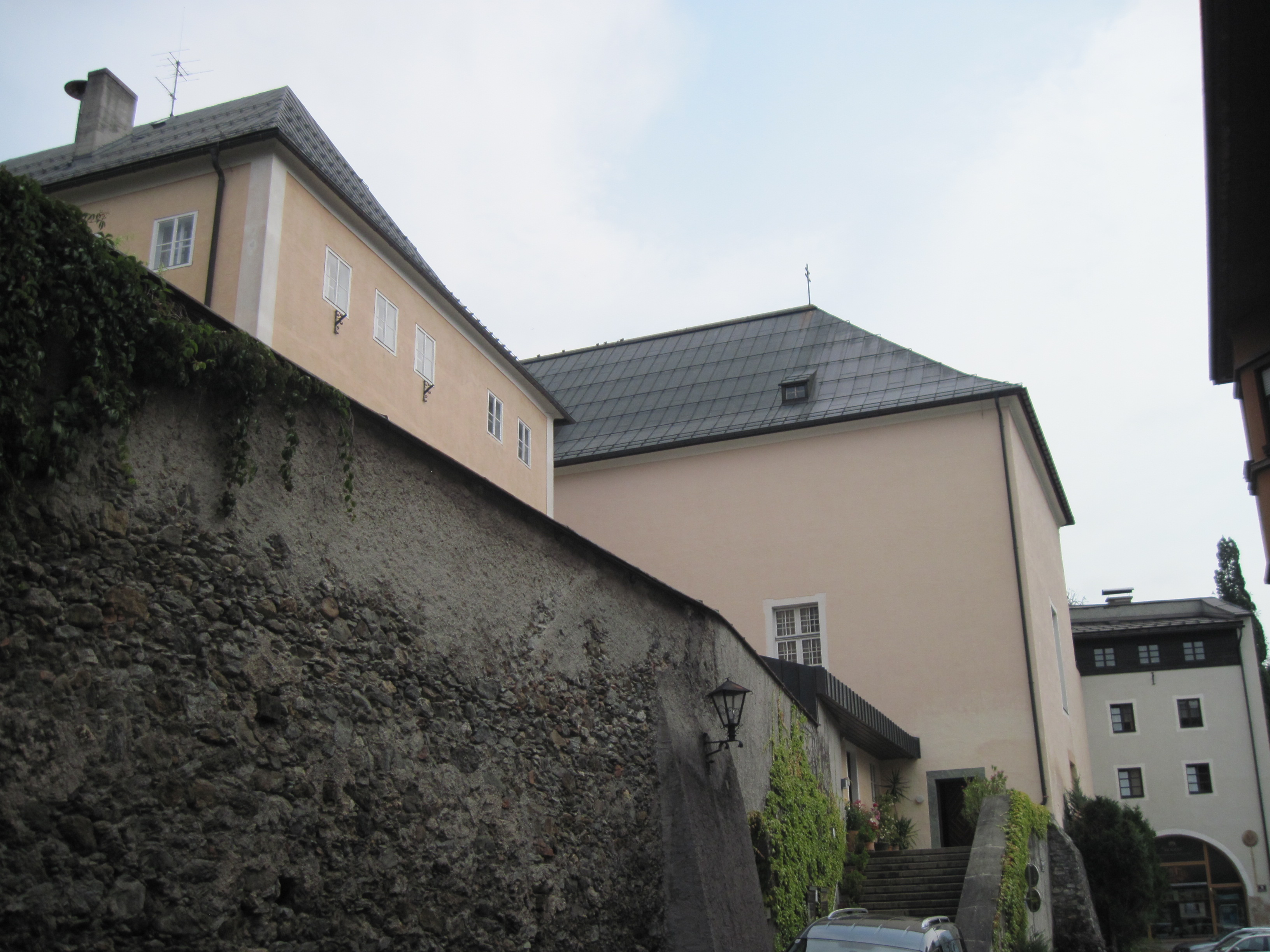 Ehem. Burg, ehem. Kapuzinerkloster, Pfarrhof